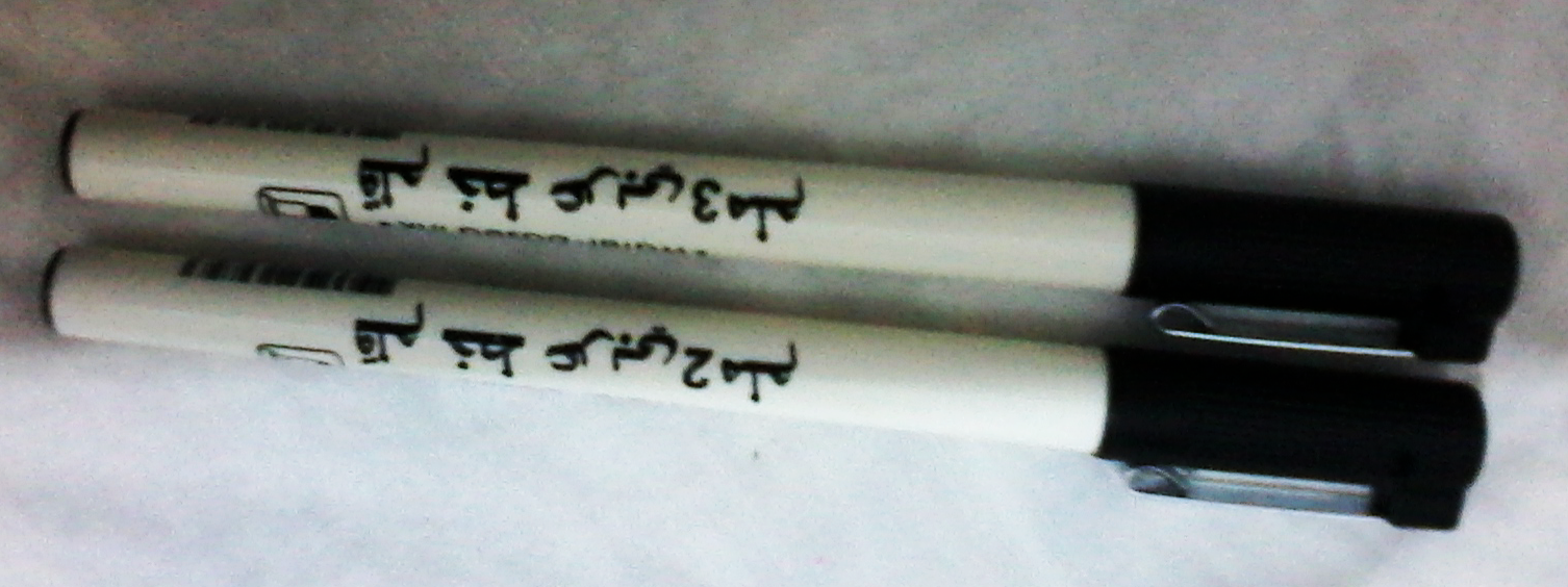 قلم خط عربي